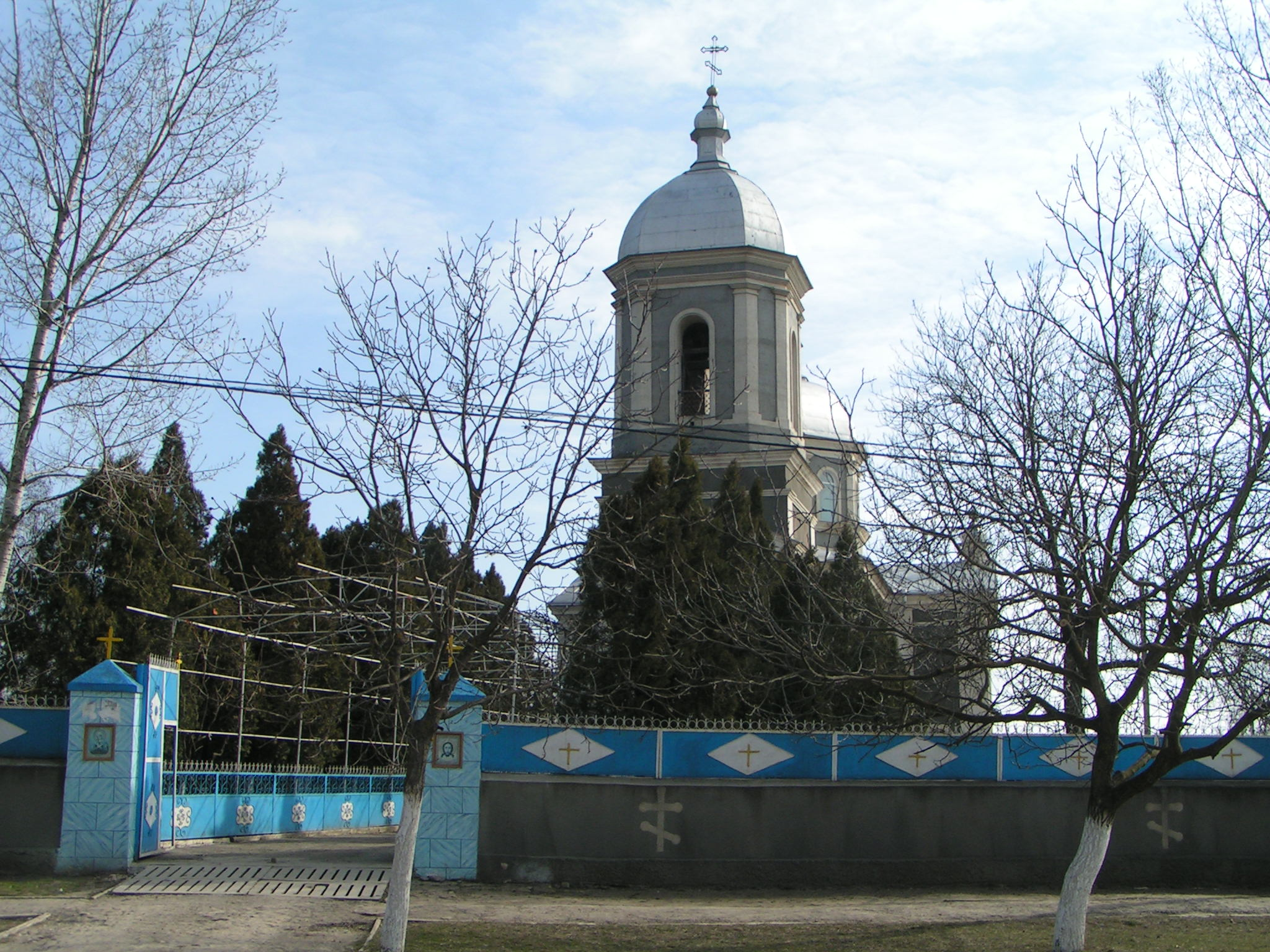 biserica din Slobozia, Ștefan Vodă